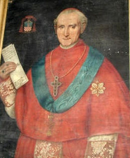 Kardinal Vincenzo Macchi (1770-1860), Apostolischer Nuntius in der Schweiz